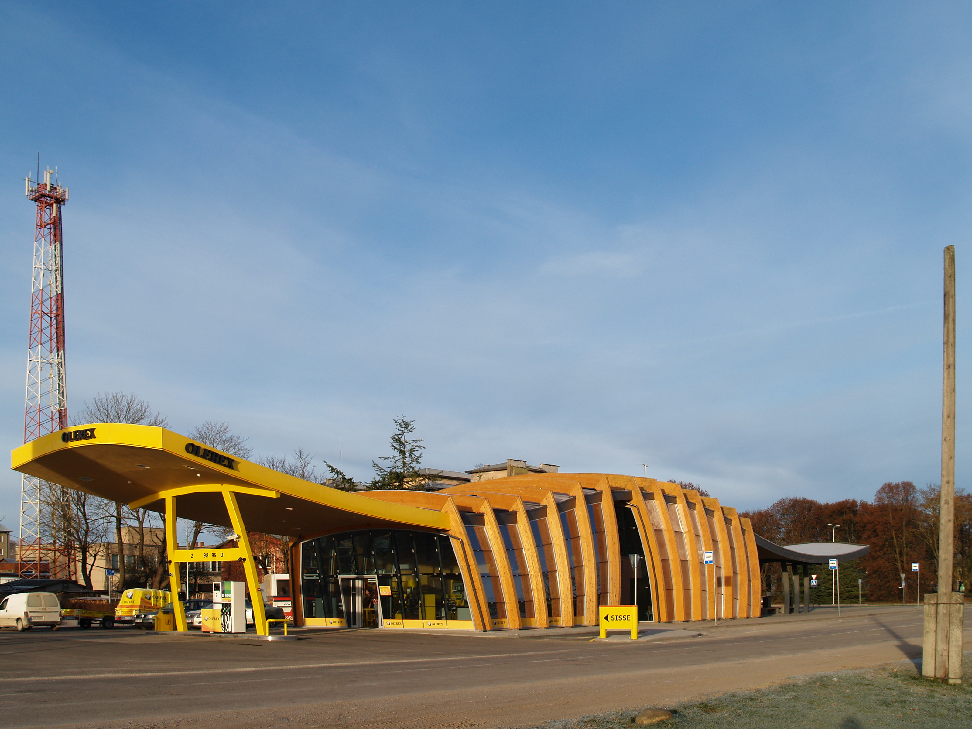 Jõgeva bussijaam